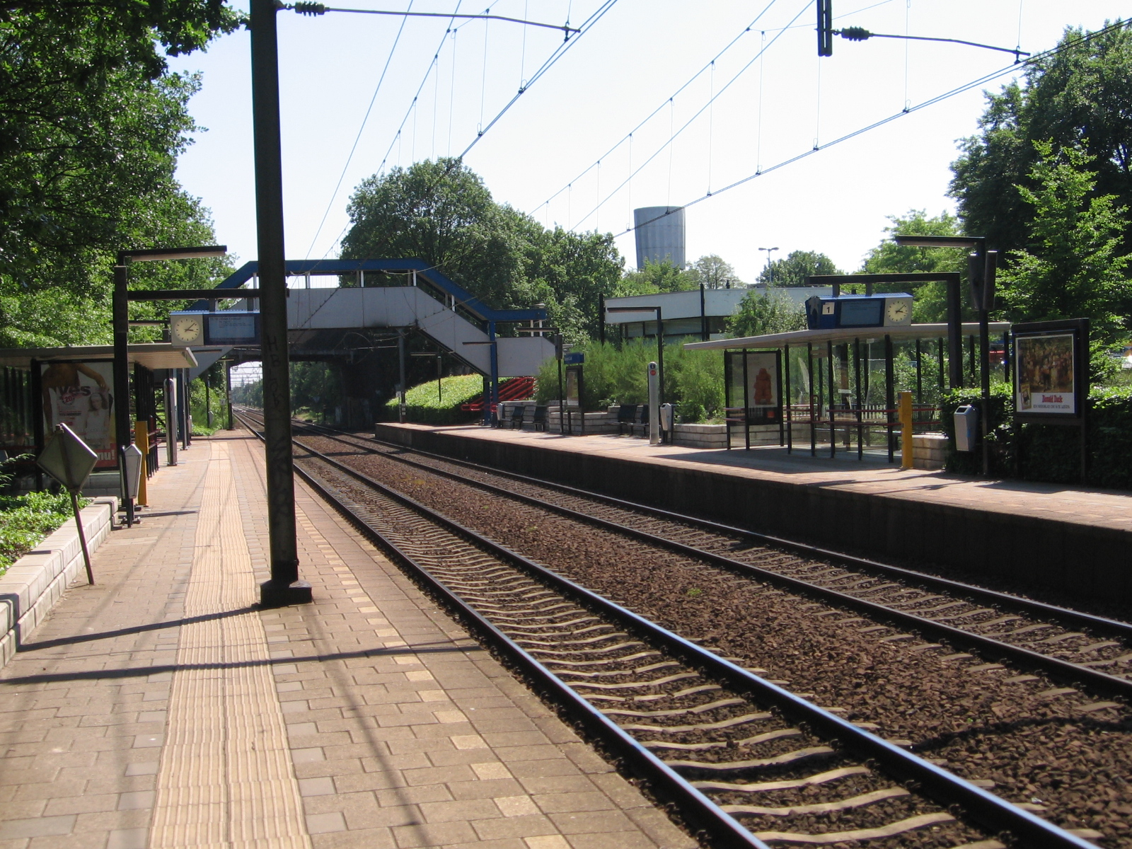 Bussum-Zuid, station, juni 2006